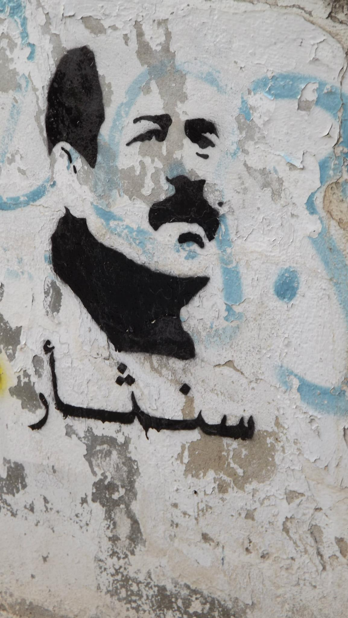 Graffiti mural à Tunis représentant le portrait de Chokri Belaid et le texte : « On se vengera »